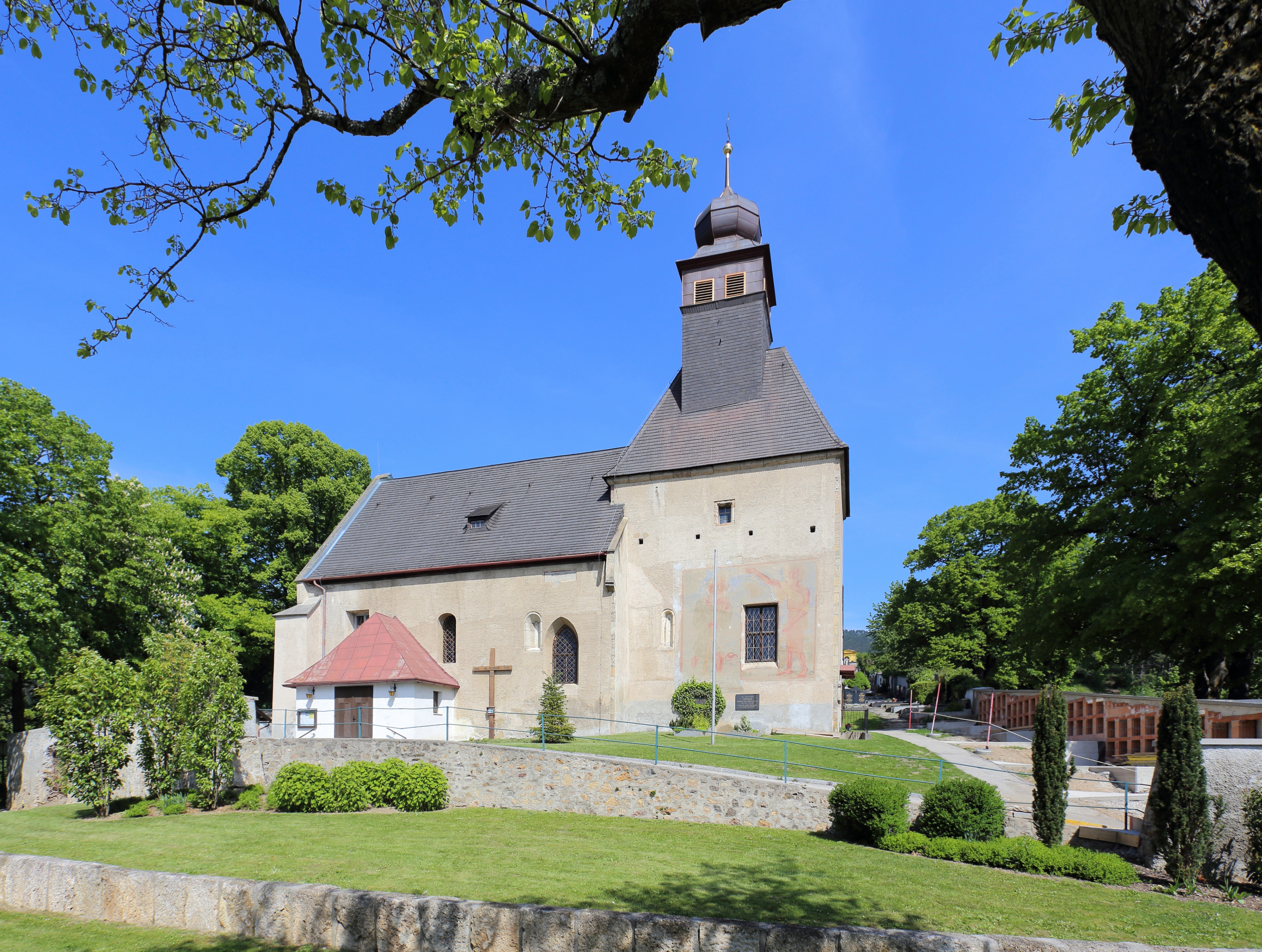 Südansicht der katholischen Pfarrkirche hl. Johannes der Täufer in St. Johann am Steinfelde, ein Ortsteil der niederösterreichischen Stadt Ternitz. Die Kirche, auf einem Hang am nördlichen Ortsrand, ist von einem Friedhof umgeben. Das spätromanische Langhaus wurde Anfang des 16. Jahrhunderts spätgotisch eingewölbt. Den frühgotischen Rechteckchor aus dem 3. Viertel des 13. Jahrhunderts baute man im 15. Jahrhundert zu einem Turm aus. Der hölzerne Dachreiter mit Zwiebelhelm stammt aus dem 18. Jahrhundert. An der Südwand des Turmes befindet sich eine monumentale Wandmalerei.